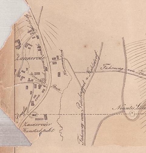 Zeichnung von dem Königlichen Elbstolln bei Brießnitz und demselben zwischen der Elbe und Zaukerode durchschnittenen Gebirge Gefertigt im Jahre 1831 von Ernst Wilhelm Lindig Anmerkung: Die bis Ende des Jahres 1831 aufgefahrenen Elbstollnlängen sind im horizontalen und verticalen Durchschnitte durch starke Linien angegeben worden. Topographischer Grundriß nach dem Maaßstabe I.